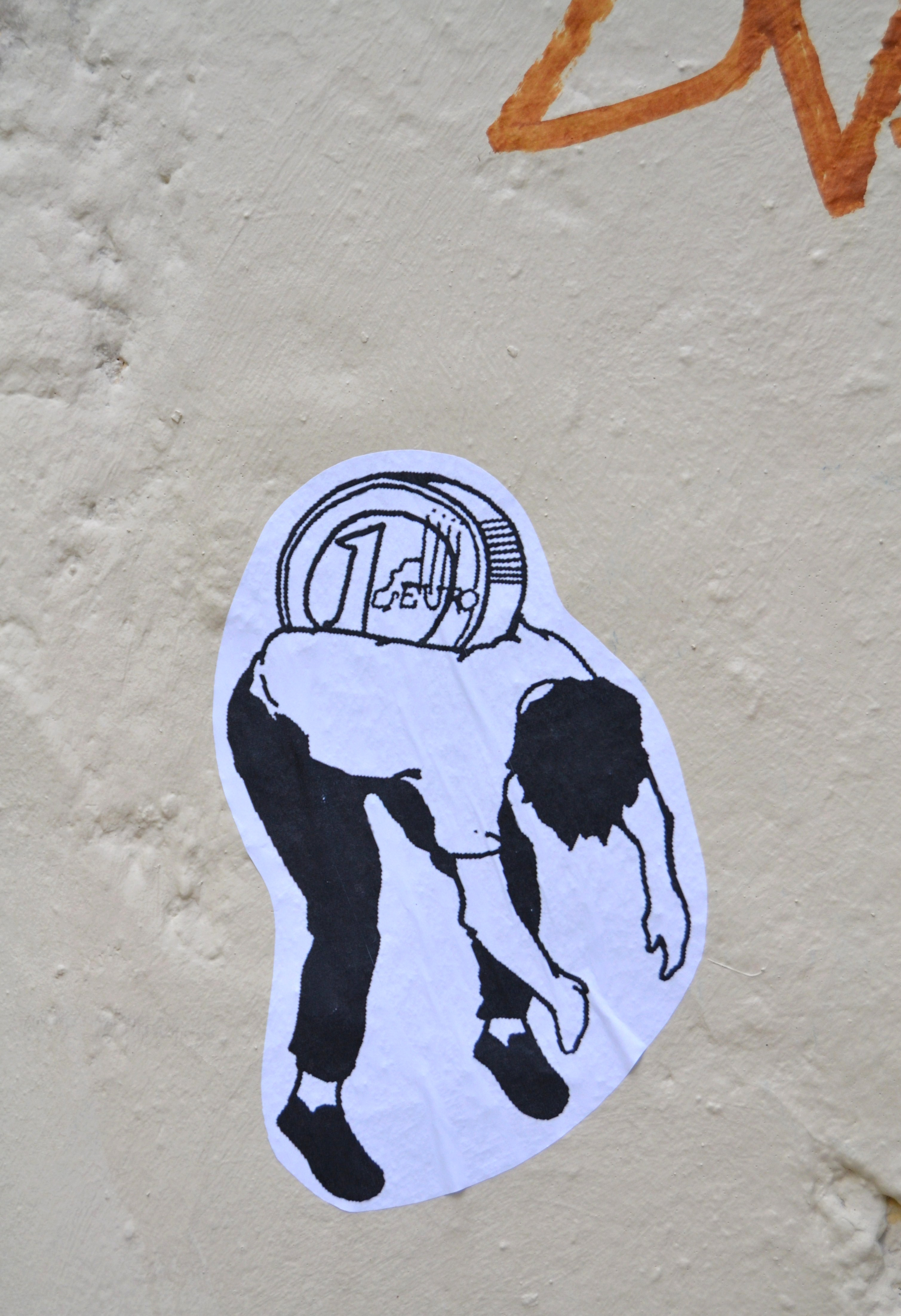 Carrer de les Adoberies de València, adhesiu.